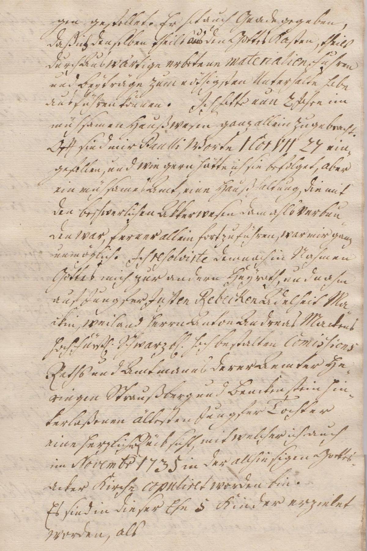 Seite 13 der Leichenpredigt für den Pastor August Wilhelm Reinhart (1696/1770), Bürger der Stadt Heringen an der Helme.